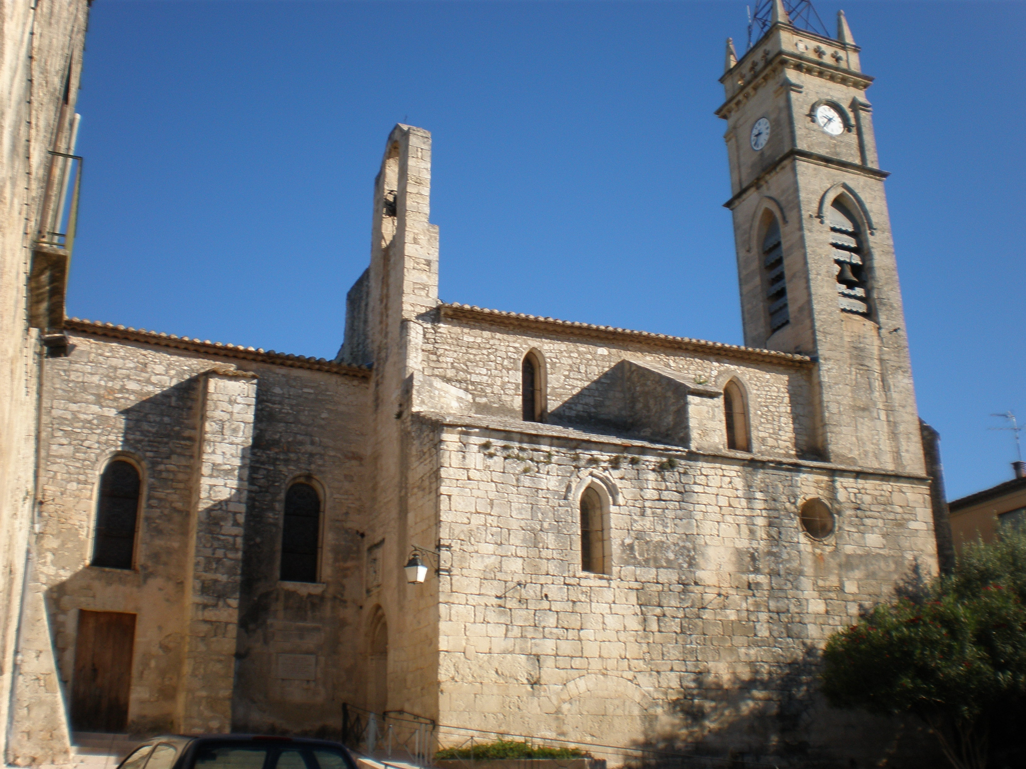 église-abbatiale Saint-Geniès de Saint-Geniès-des-Mourgues (Hérault, France)